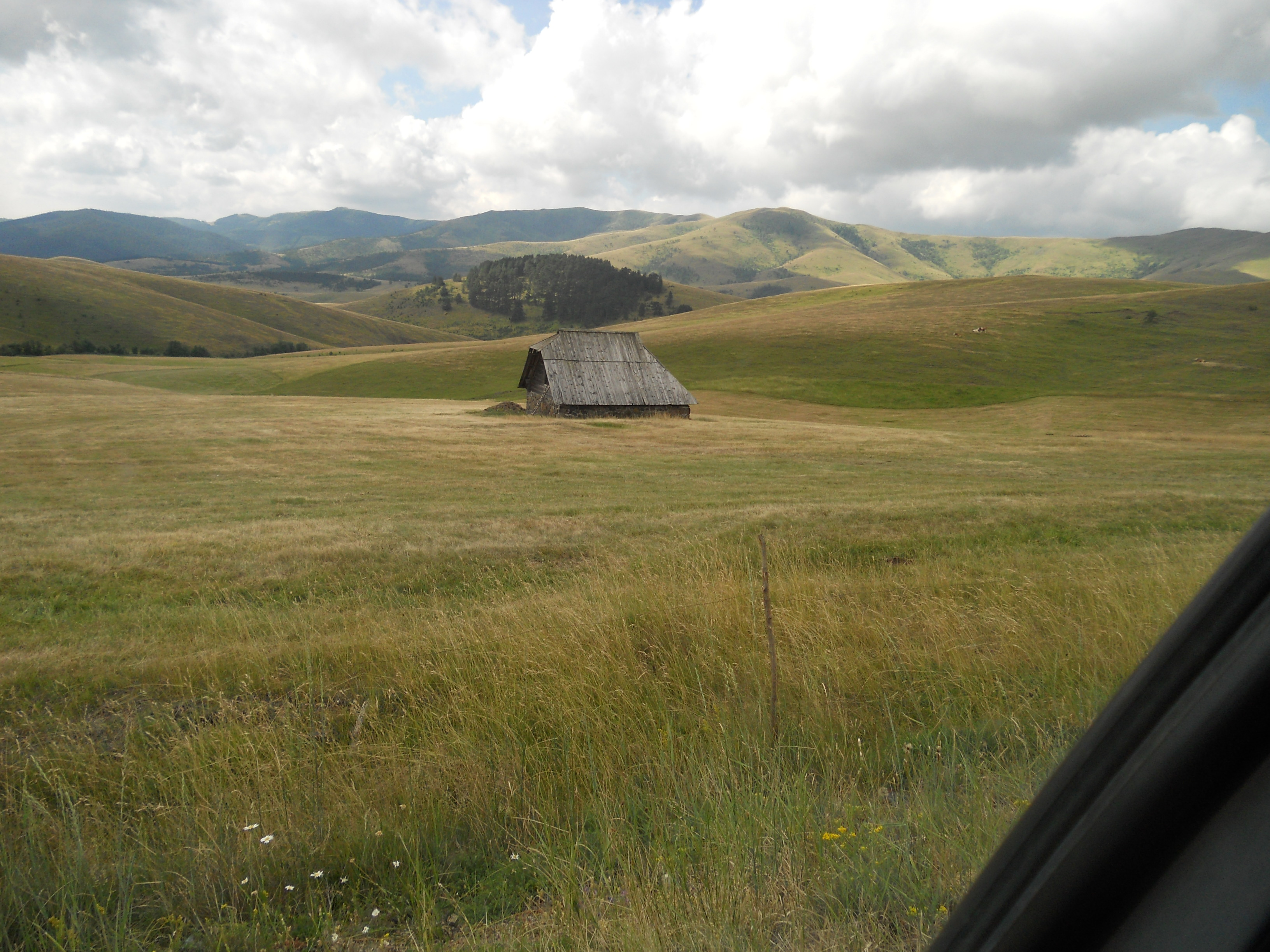 Zlatibor-pejsaž